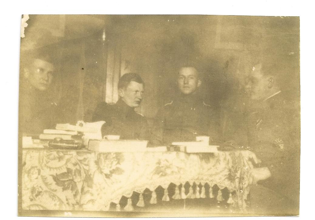 Ernst Jünger (zweiter von rechts) zusammen mit Heinrich Hambrock (zweiter von links) der in seinem Buch "In Stahlgewittern" mehrfach erwähnt wird.